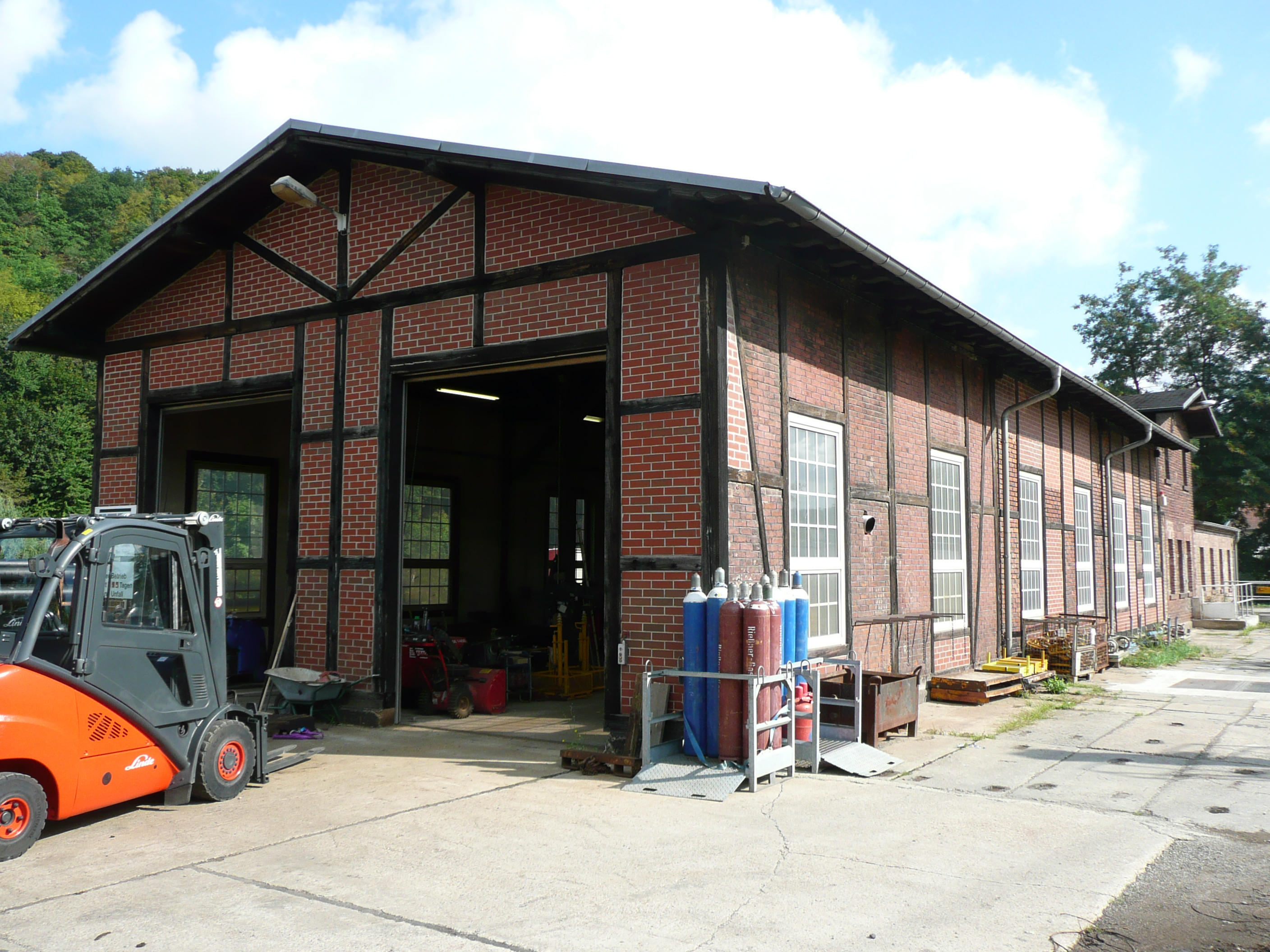 ehemaliger Lokschuppen der Schmalspurbahn des Bahnhof Freital-Potschappel